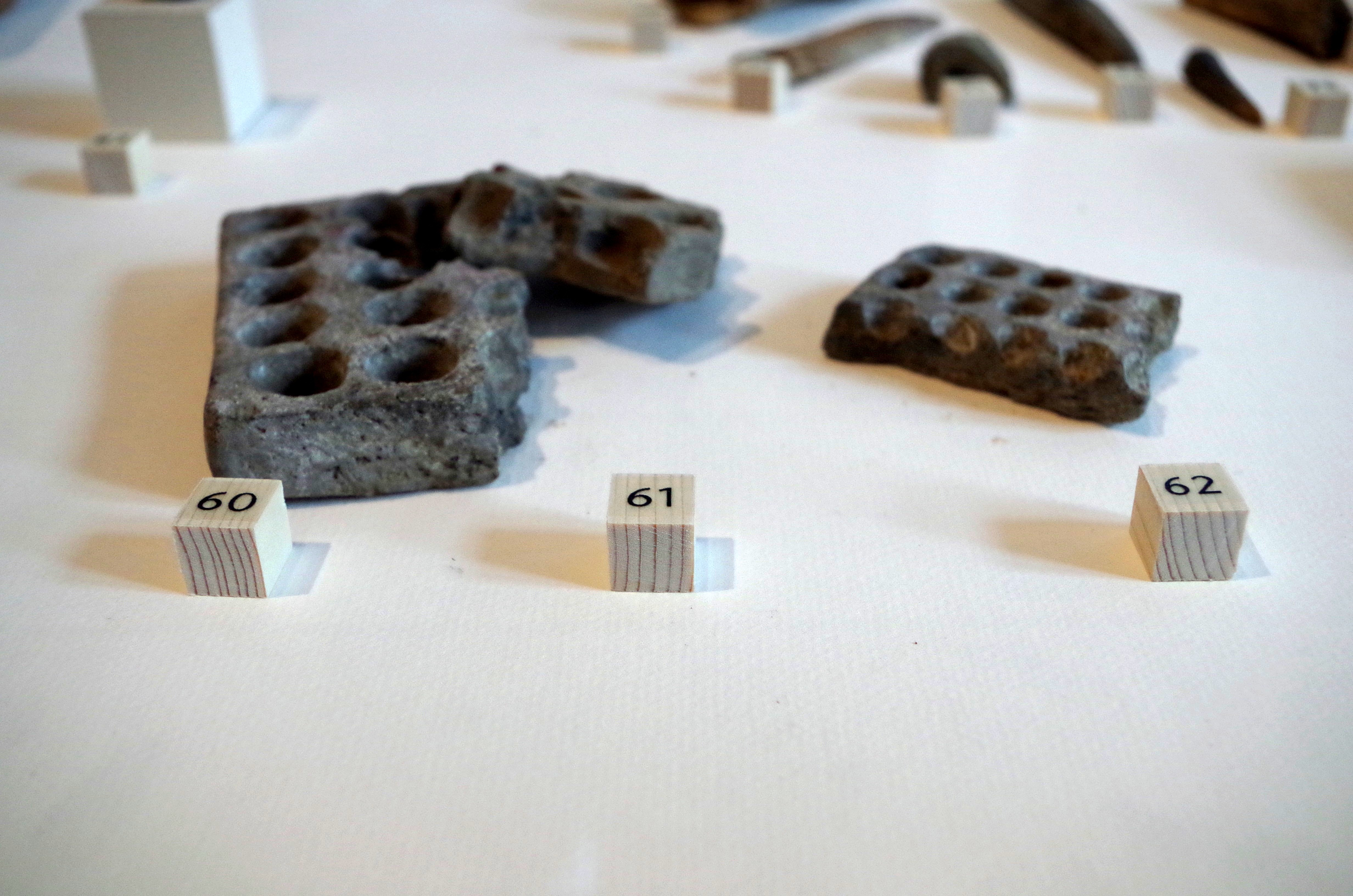 Plaques à alvéoles trouvées à Amboise. Voir Jean-Marie Laruaz (dir.), Ambacia, la Gauloise - 100 objets racontent la ville antique d'Amboise, Chemillé-sur-Dême, Archéa, 2017, p. 97.